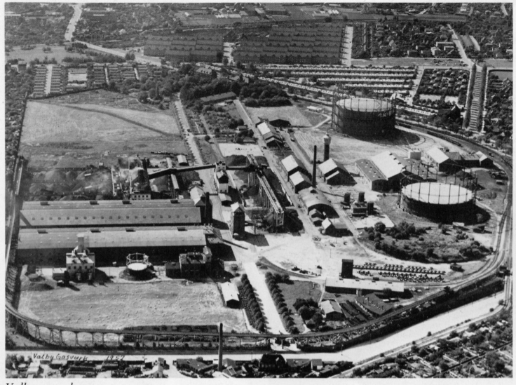 Valby Gasværk 1952